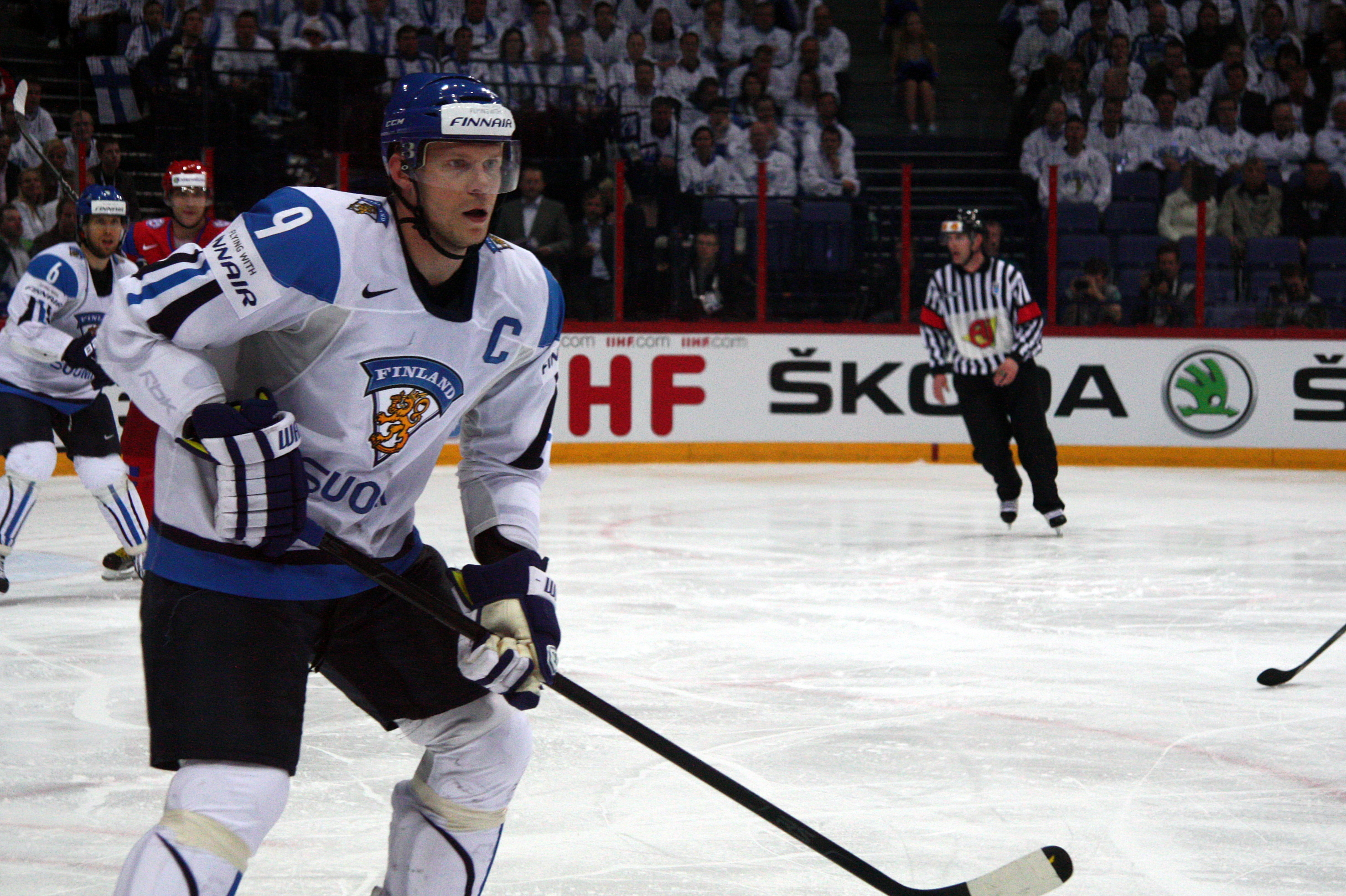 Микко Койву. ЧМ 2012, Полуфинал, 19.05.2012, Финляндия-Россия, Хельсинки.